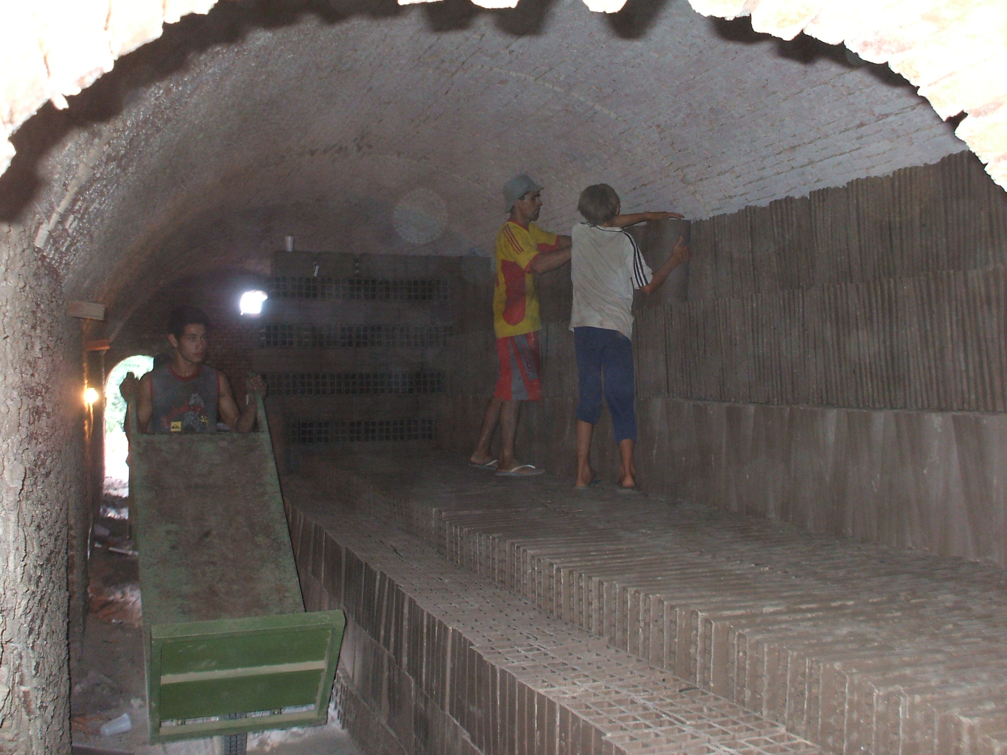 fachada